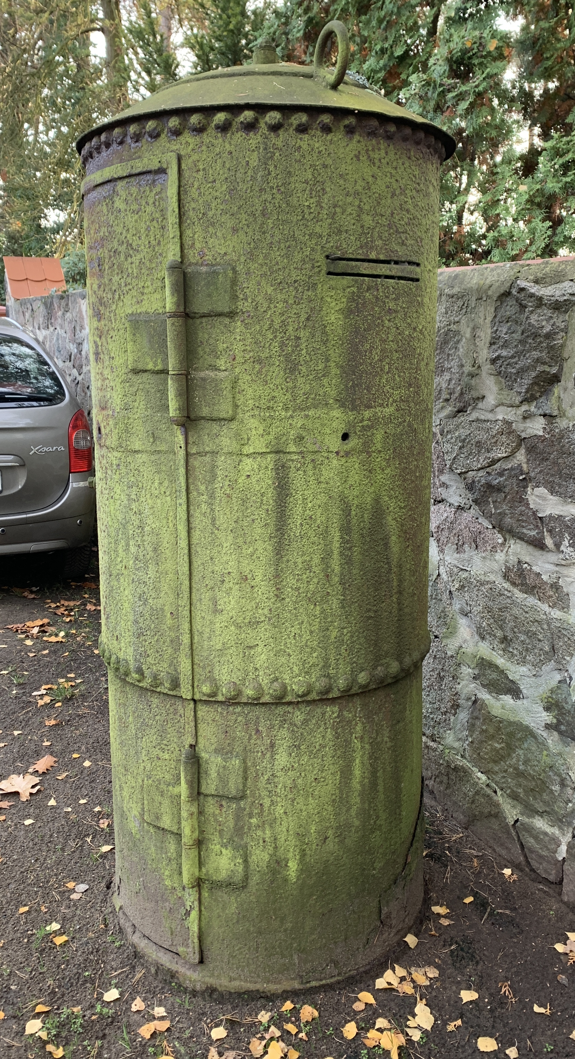 Kulturdenkmal Splitterschutzzellen, Straße des Friedens in Coswig